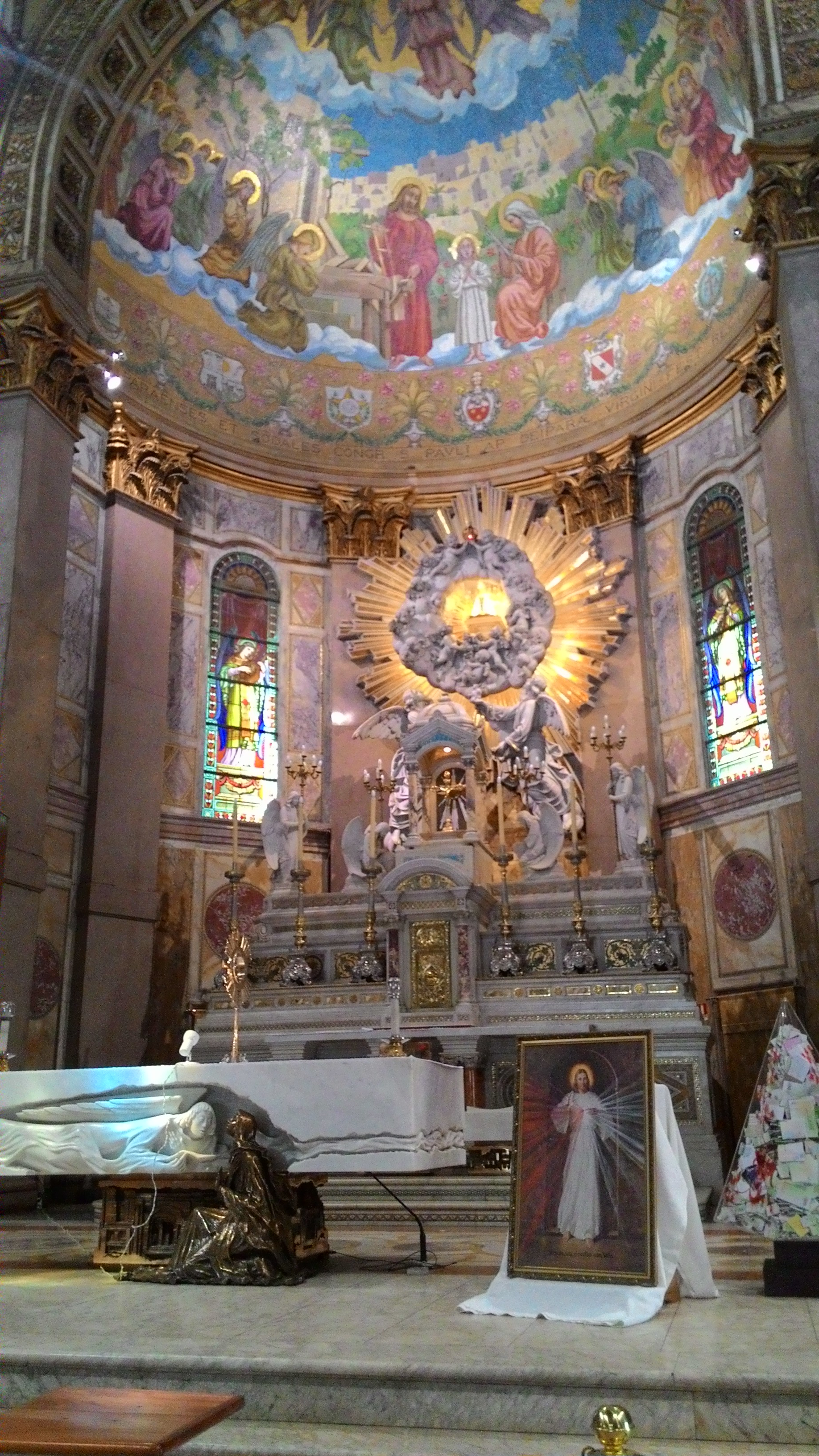 Avenida Nazareth: conjunto arquitetônico